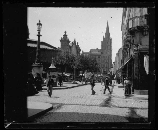 Place des Carmes, côté nord. Vers juillet 1905. Vue perspective du côté nord de la place prises depuis la rue du Canard. A droite façades des maisons à gauche le marché des Carmes ; en arrière-plan clocher de la Dalbade ; candélabre ; passants.